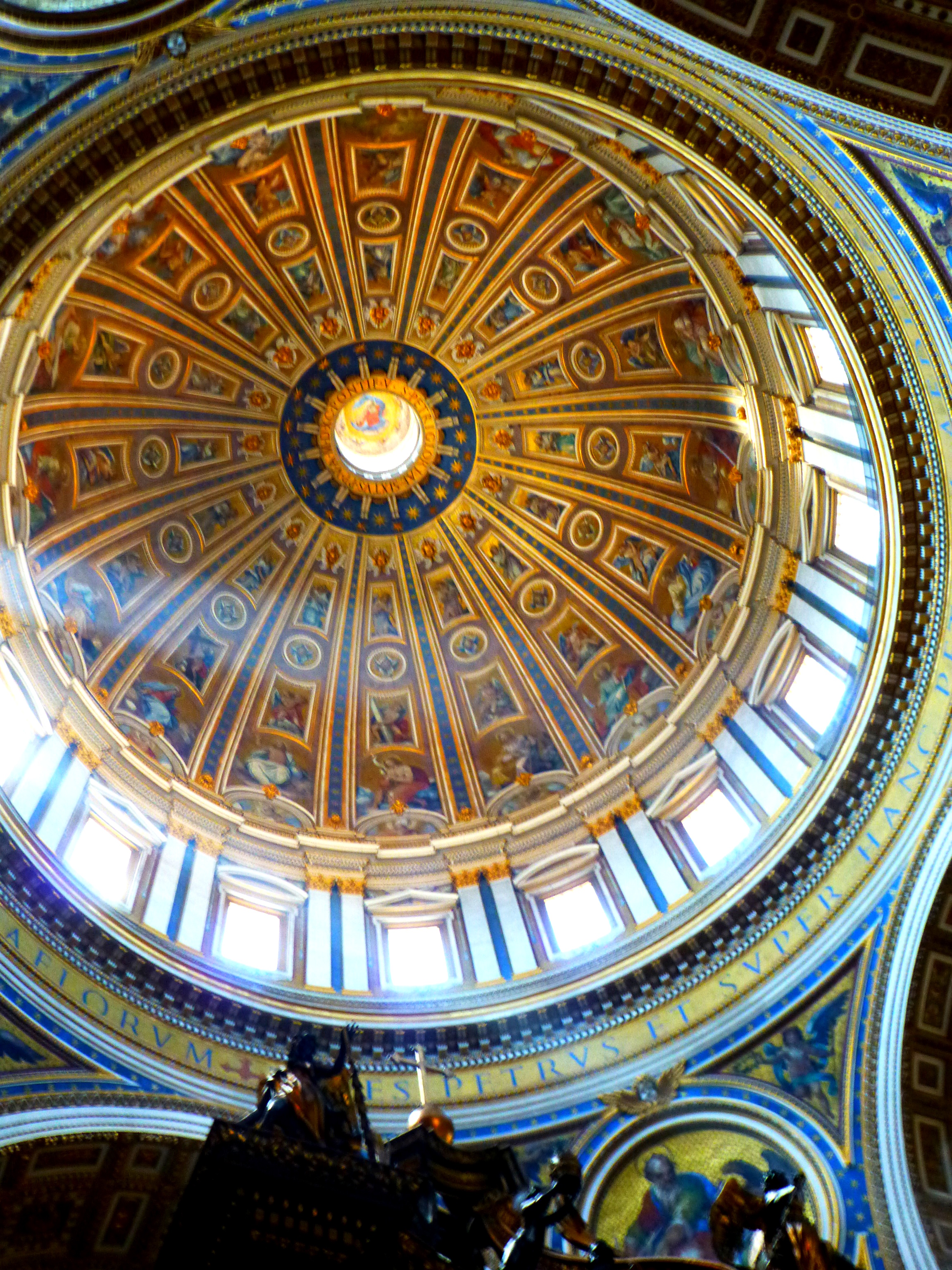 Dome de La Basilique St Pierre